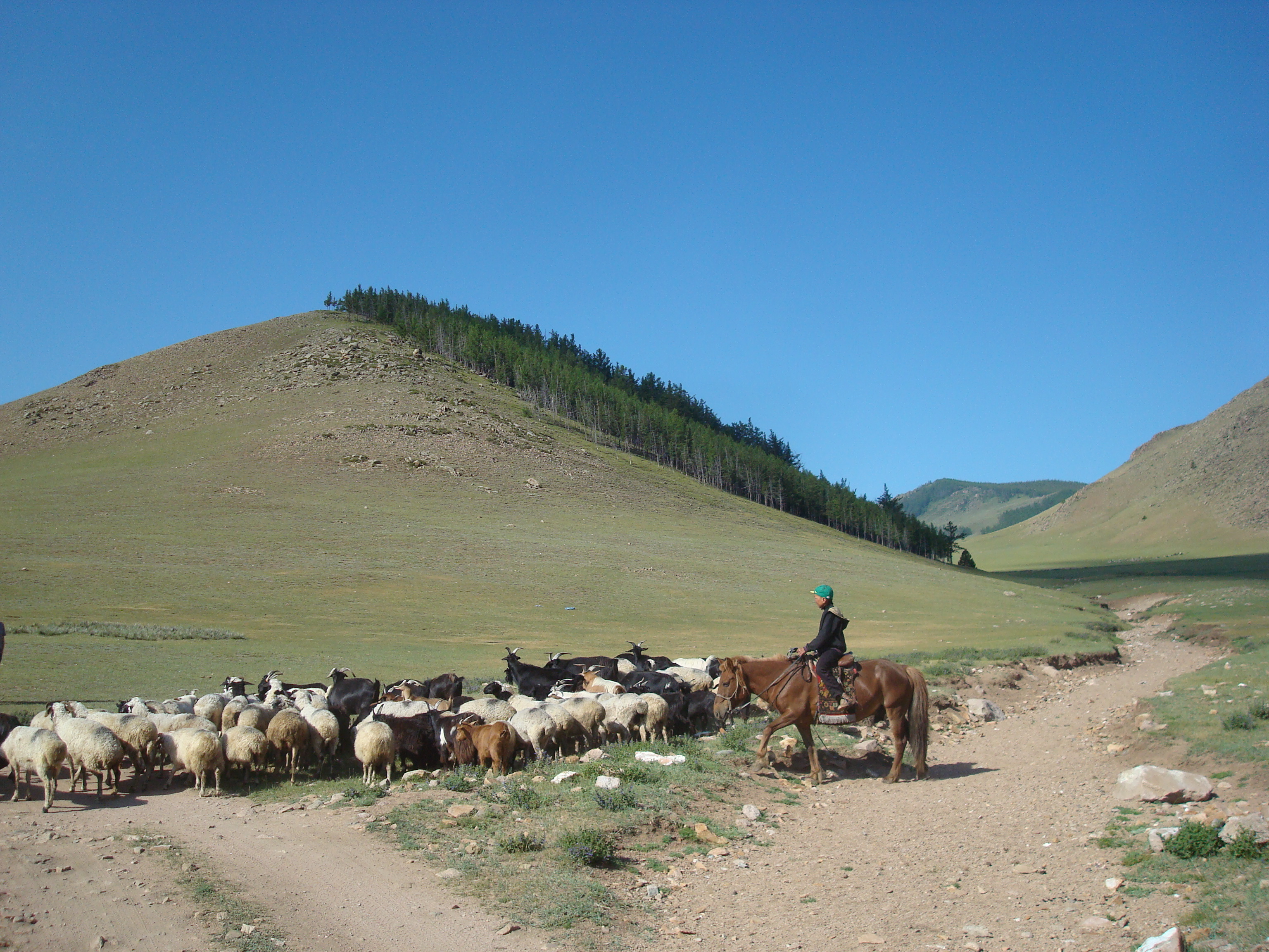 Herdentrieb bei Jargalant im Chöwsgöl-Aimag